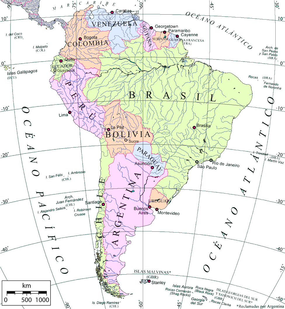 Mapa político de América del Sur en español, capitales, 2 ciudades mayores de Brasil, islas periféricas, ríos. Proyección azimutal equivalente. Political map of South America in spanish, capitals, 2 biggest cities of Brazil, periferical islands, rivers. Azimuthal equal-area Projection